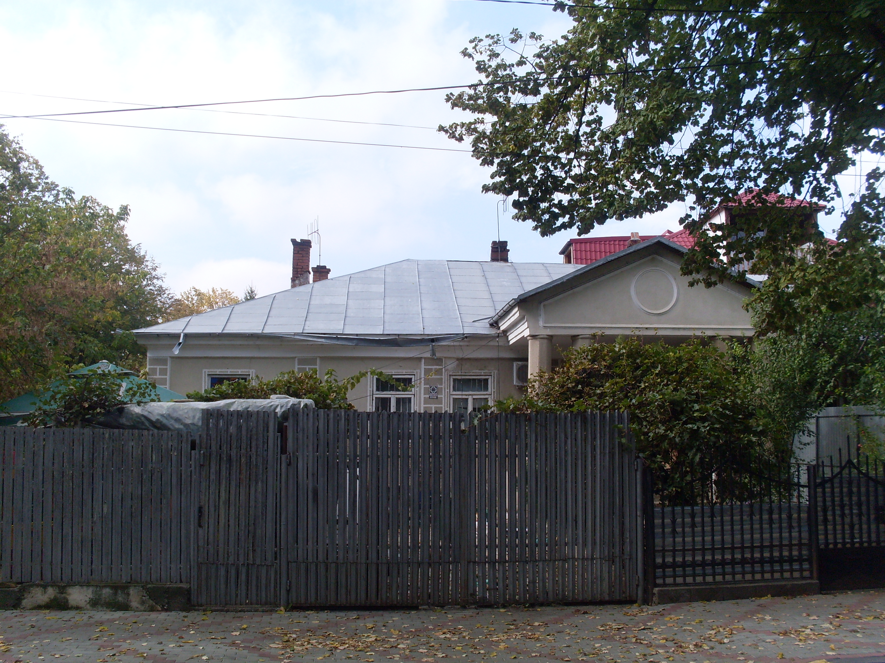 Casa Hulea